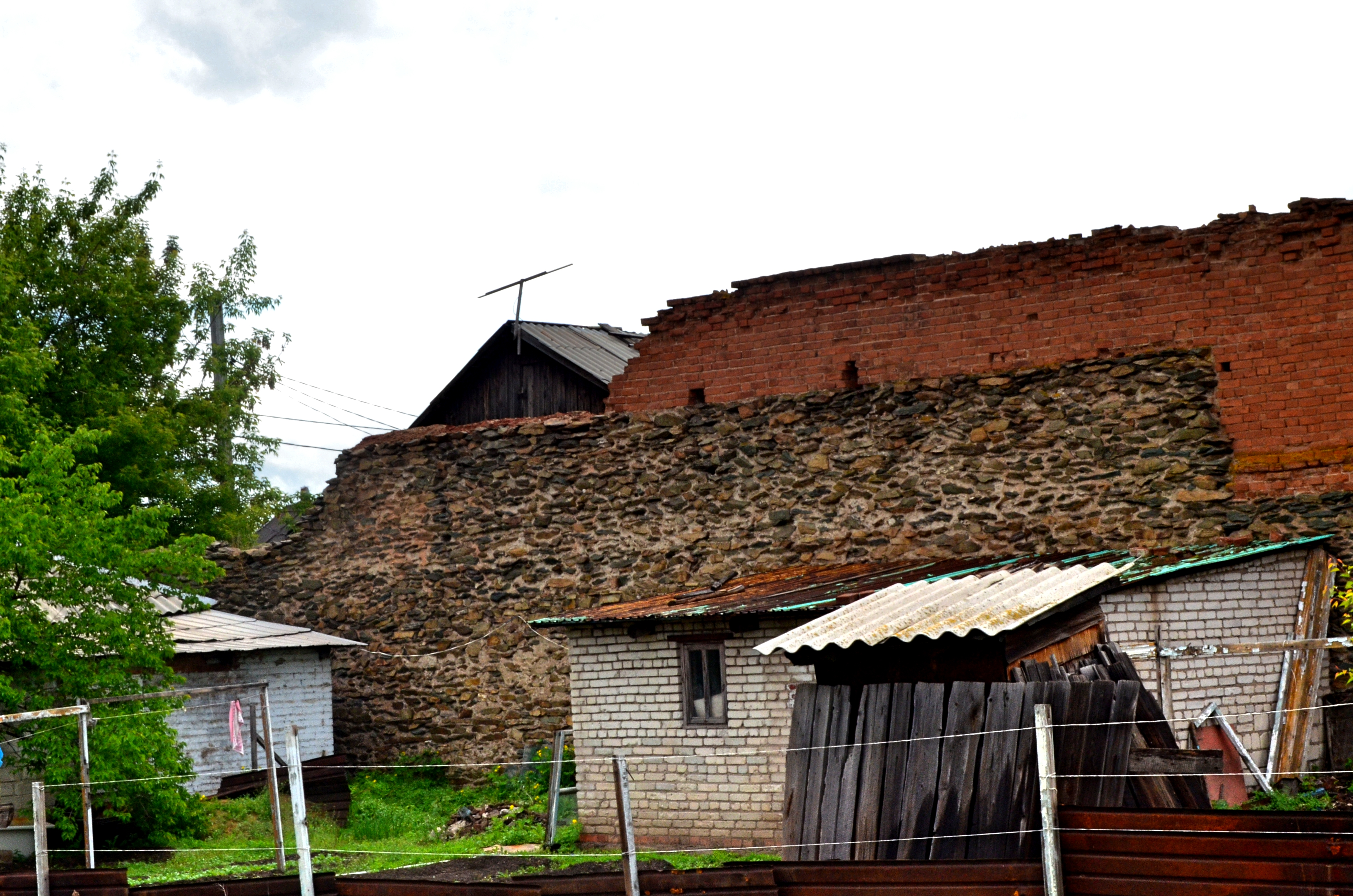 Остатки крепости Оренбург (Орск), основанной в 1735 году: Преображенская (Яшмовая) гора, Орск, Оренбургская область